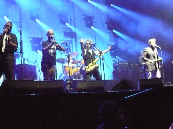 Los Fabulosos Cadillacs en Medillín, Colombia